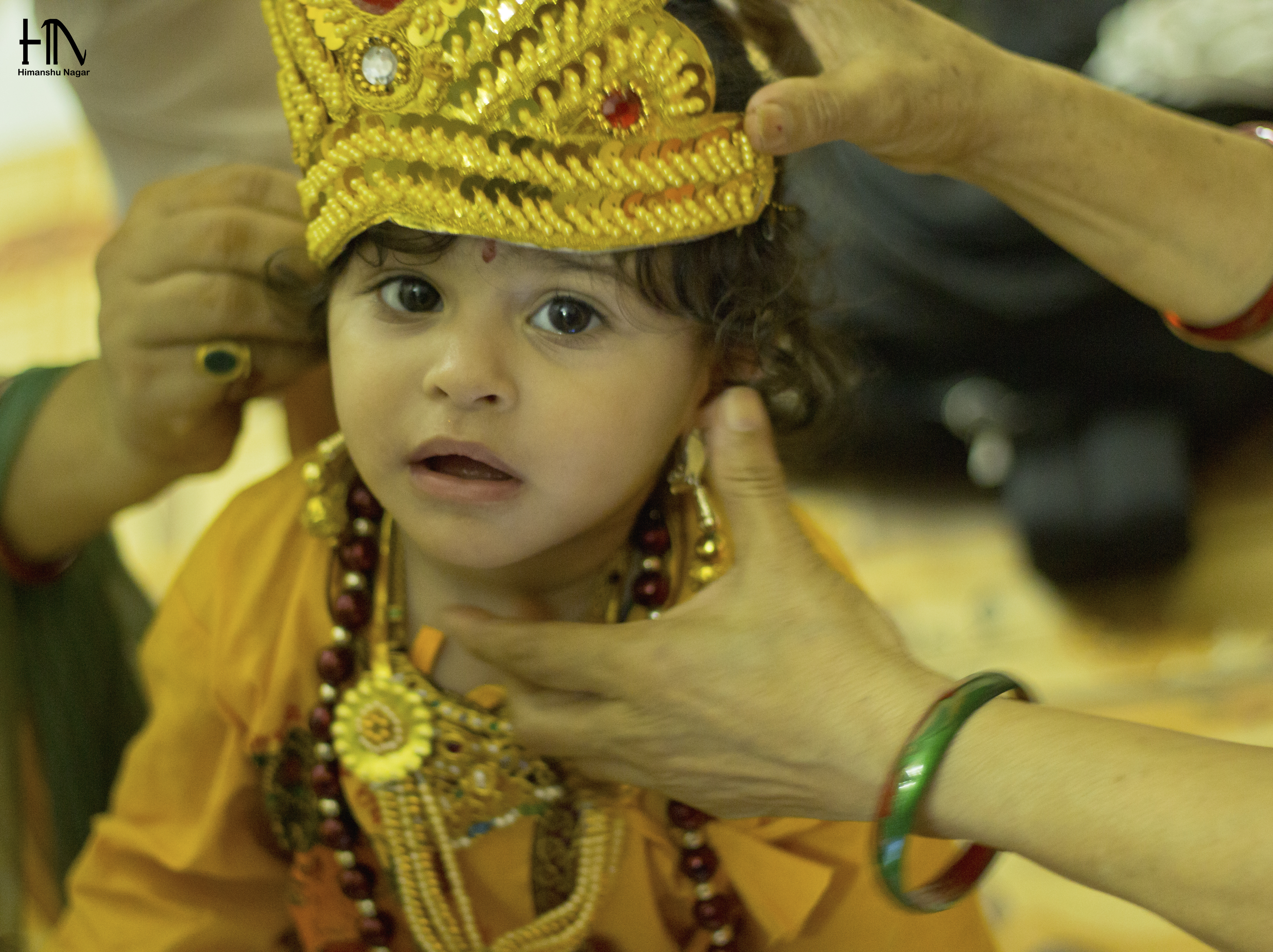 Delhi India 2013